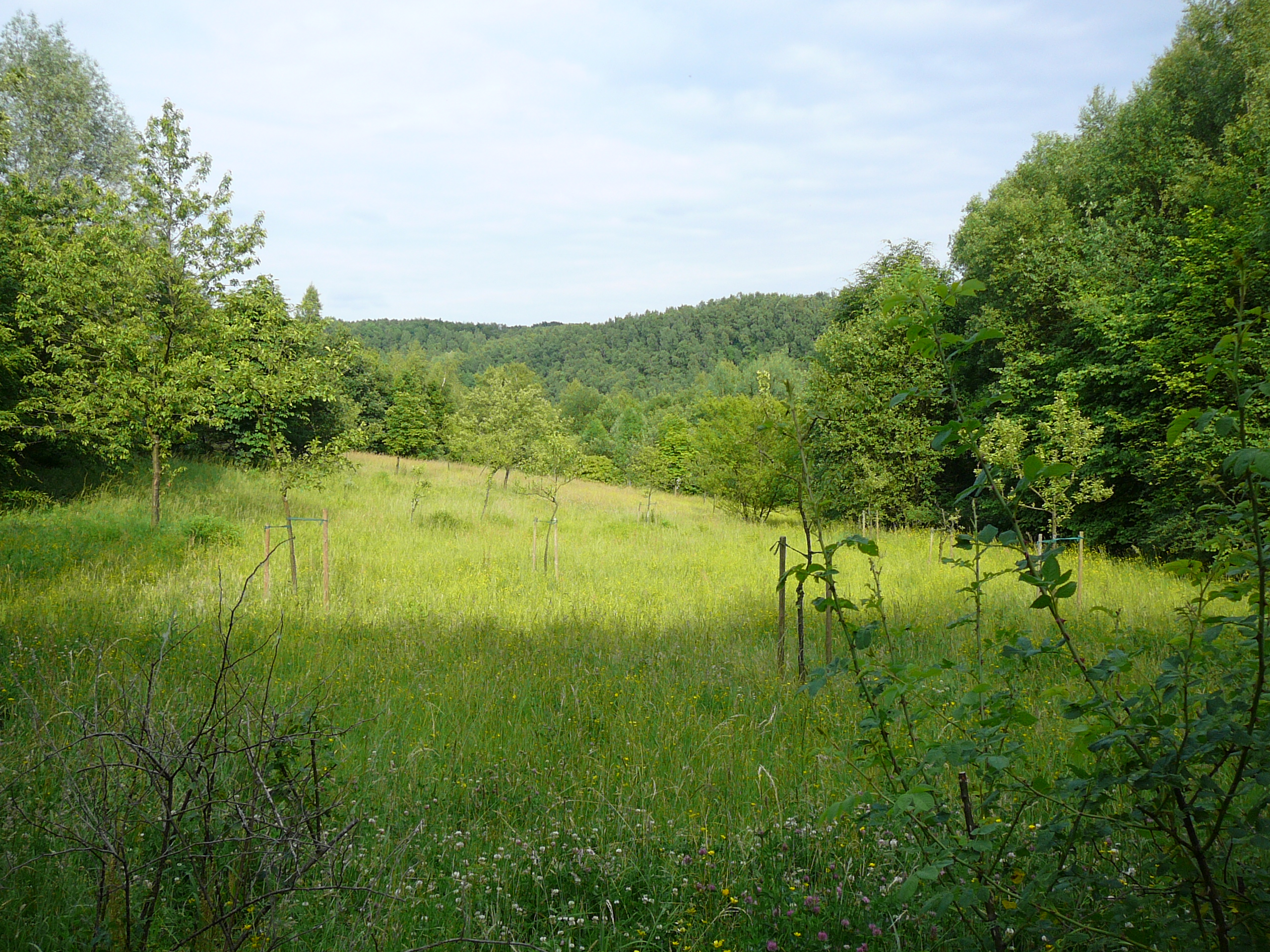 Grube 7, Haan-Gruiten